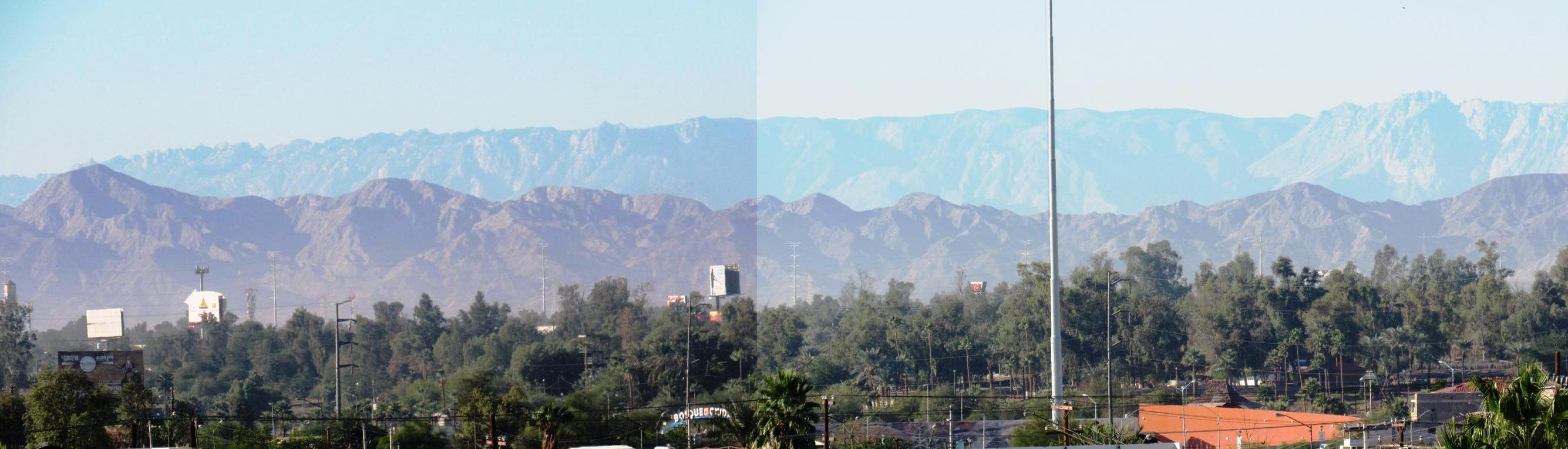 Segmento de la sierra cucapá, en primer plano del horizonte, y de la sierra de Juárez, en segundo plano al fondo del horizonte, vista hacia el suroeste desde Centro Cívico de la ciudad de Mexicali.